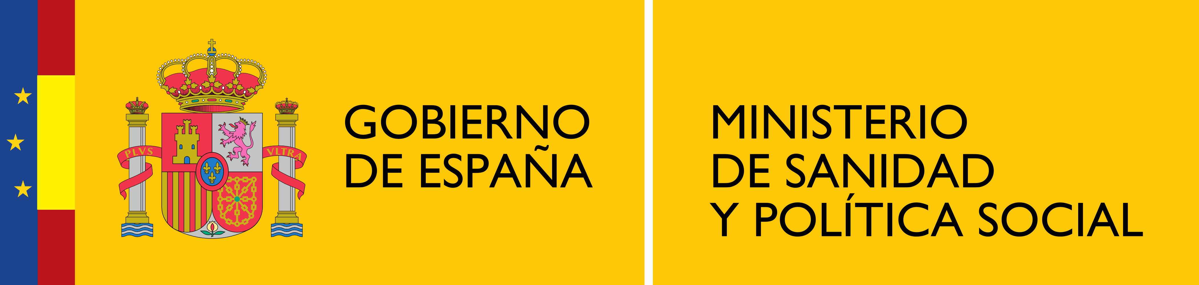 Logotipo del Ministerio de Sanidad y Política Social